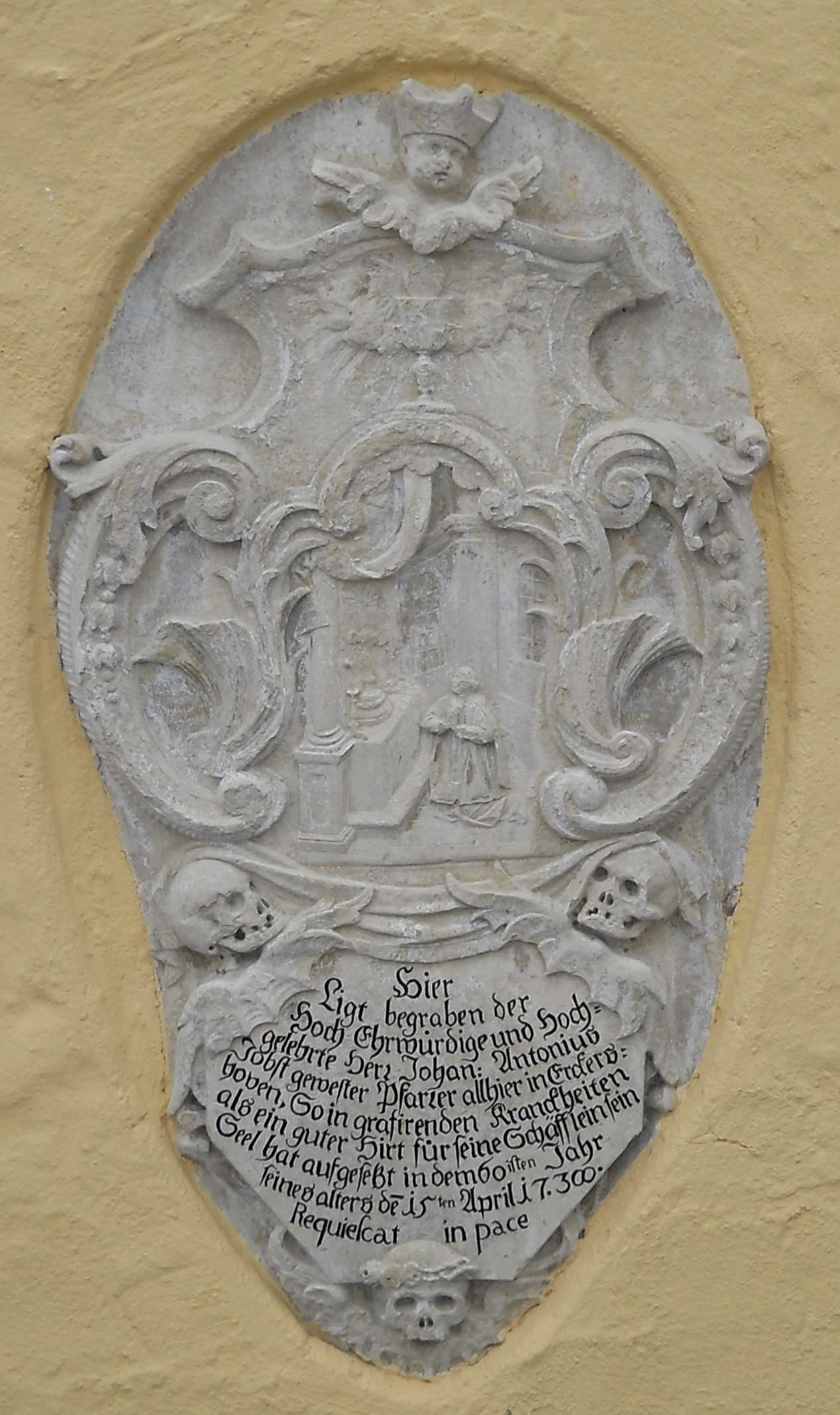 Barock-Epitaph an der Kirche St. Ägidius in Erkertshofen im Landkreis Eichstätt (Oberbayern)